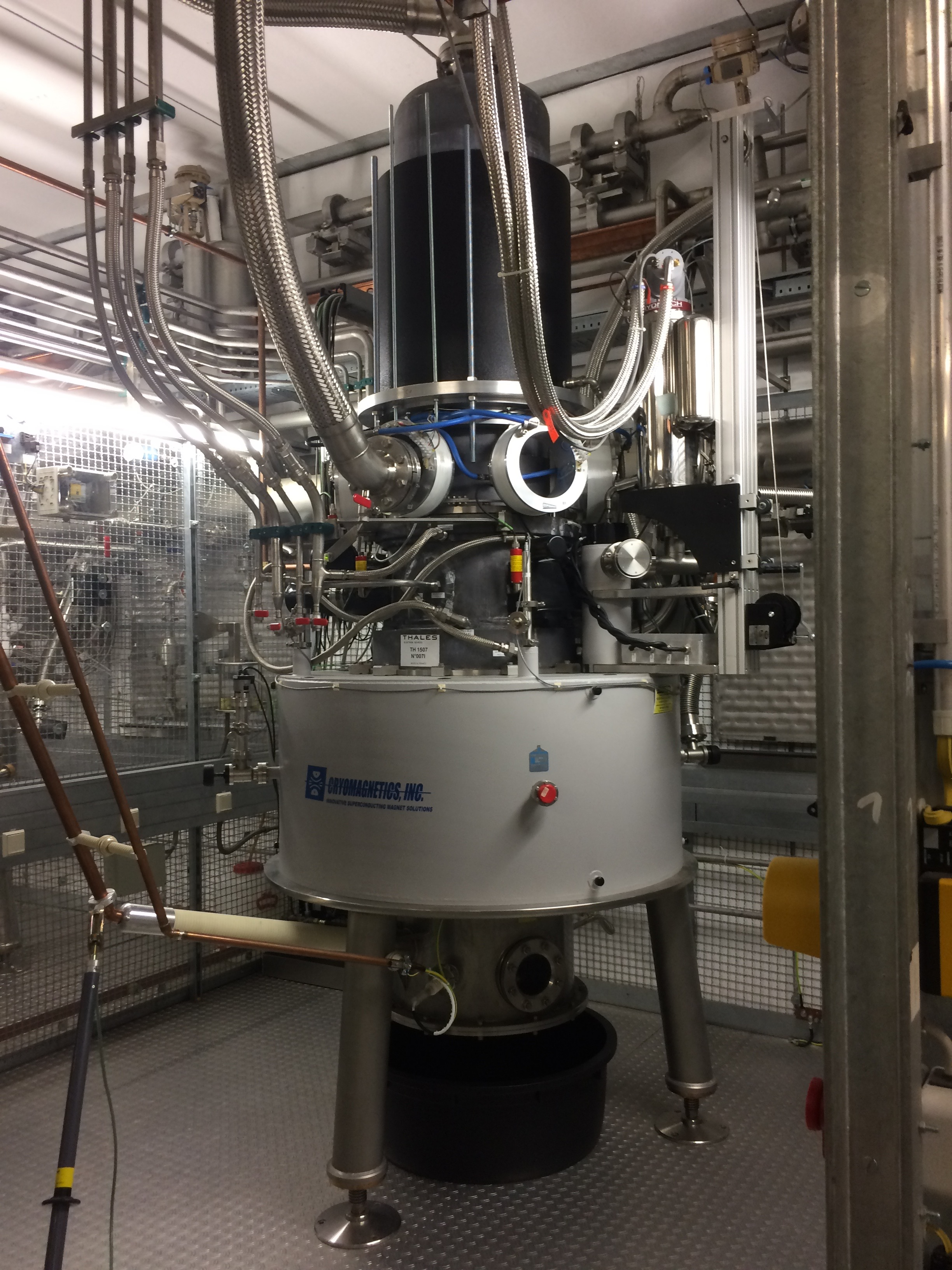 Wendelstein 7-X, Gyrotron,140Ghz, 1MW